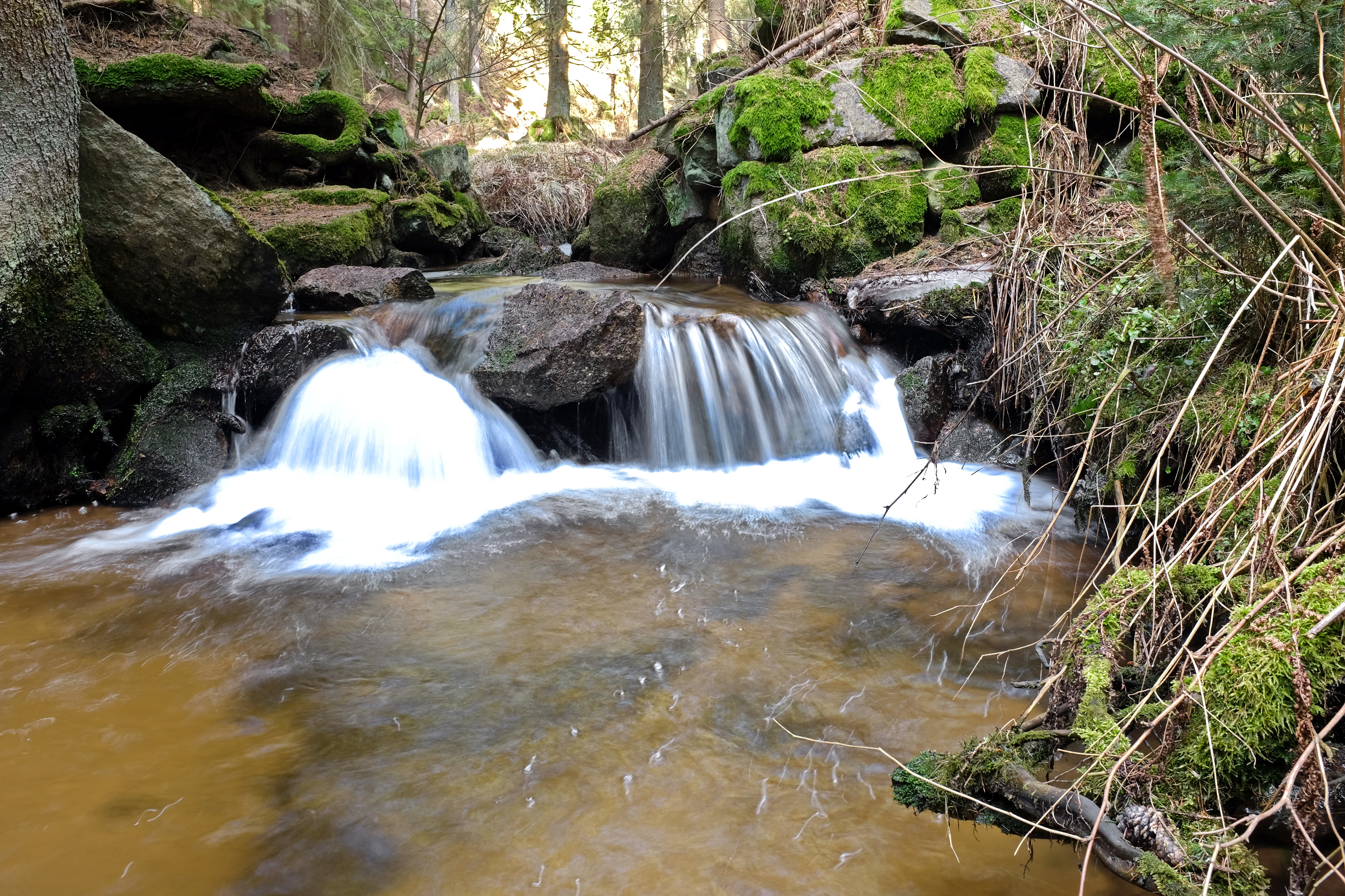 Podleský potok, Slavkovský les, okres Cheb